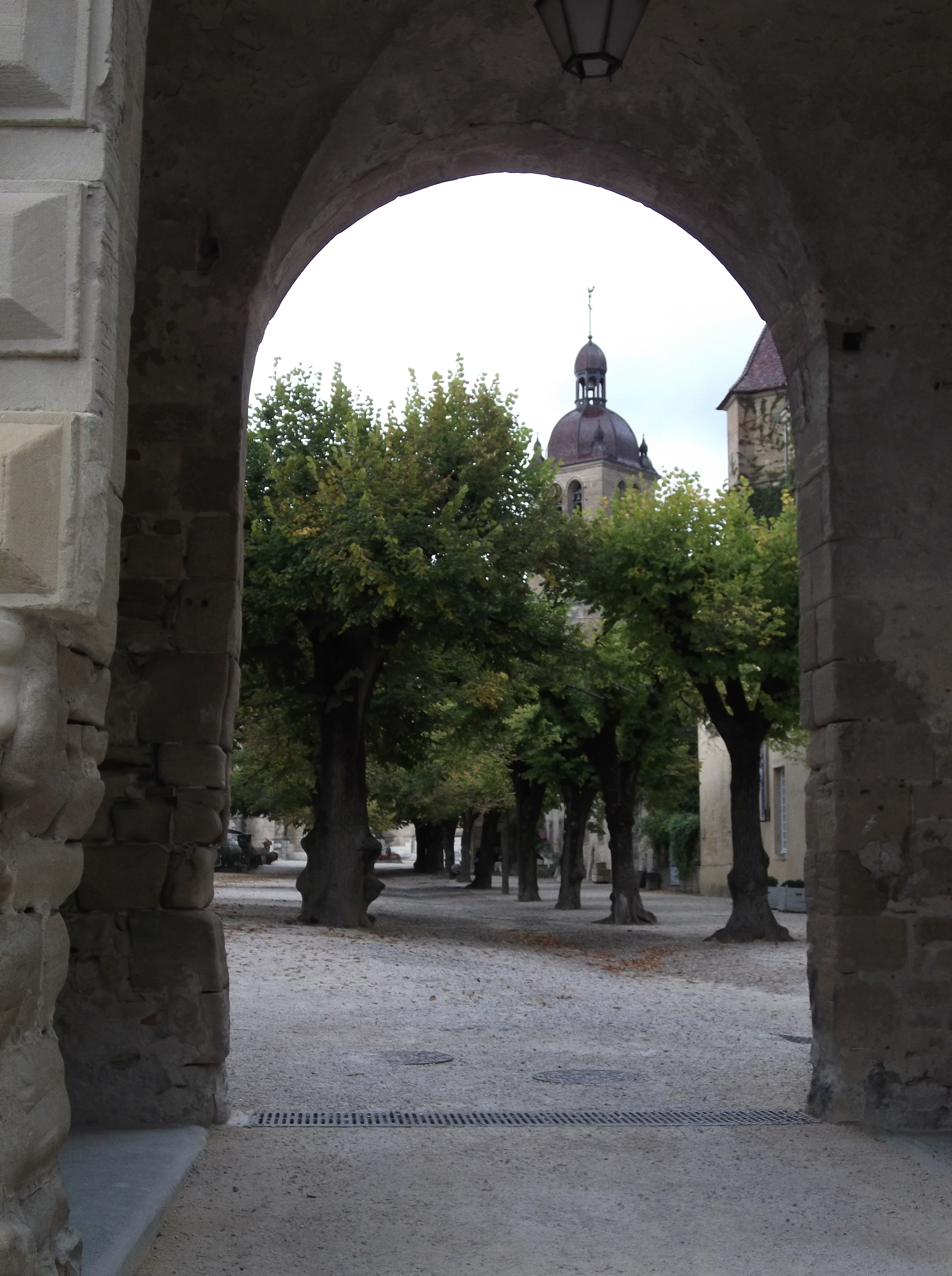 Église Notre-Dame de la Jayère _ Clocher Eglise Saint-Antoine-l'Abbaye 38160 PA38000020 VAN DEN HENDE8ALAIN CC -BY-SA 4 0 02064 .